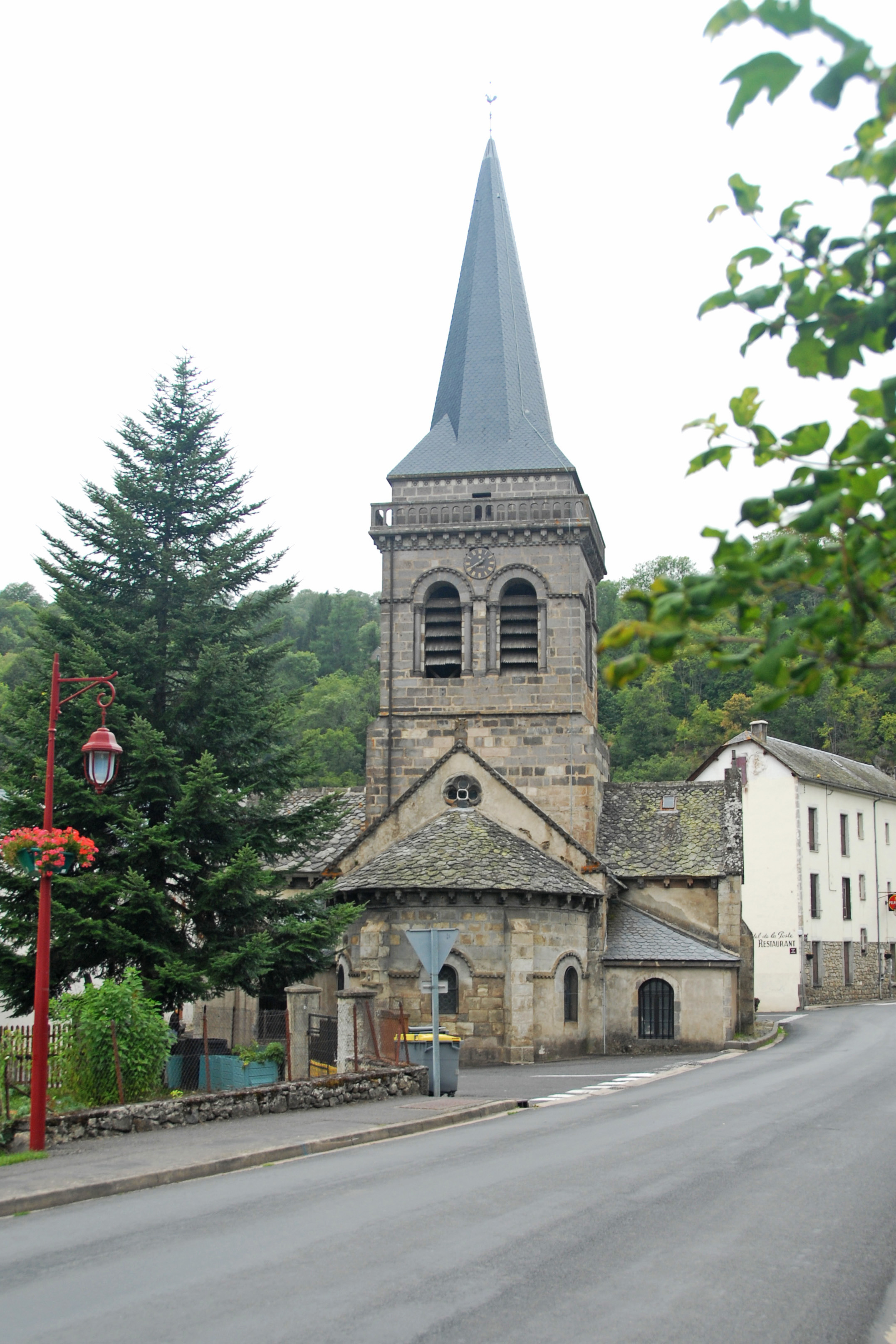 Dorfkirche Chambon-sur-Lac, Chorhaupt, v. SW